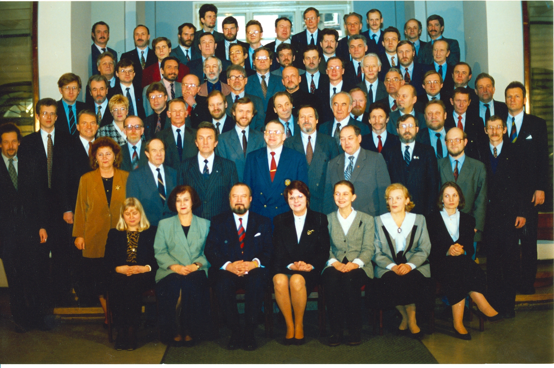 VII Riigikogu koosseisu ühispilt 1. märts 1995